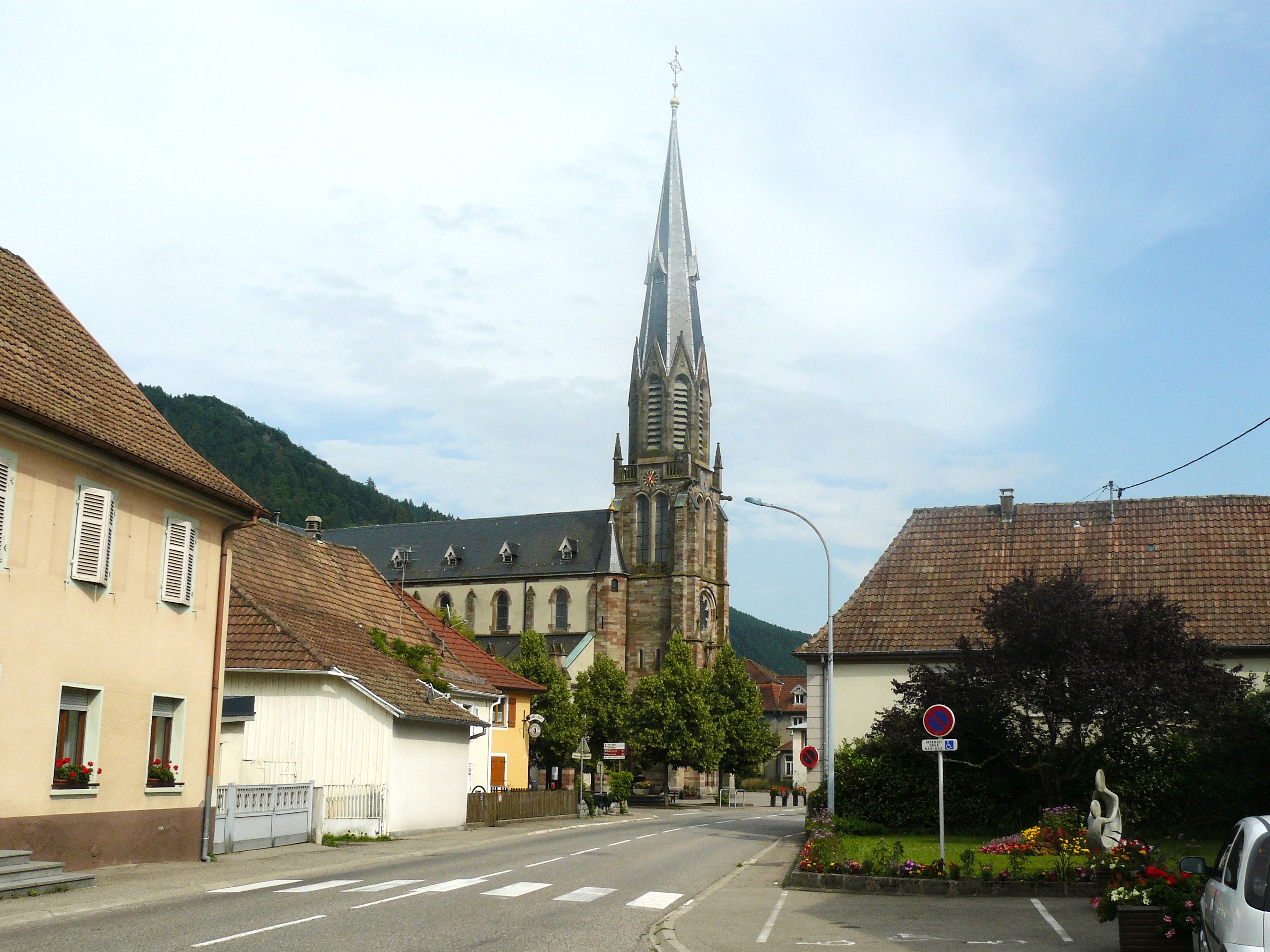 Église Saint-Antoine